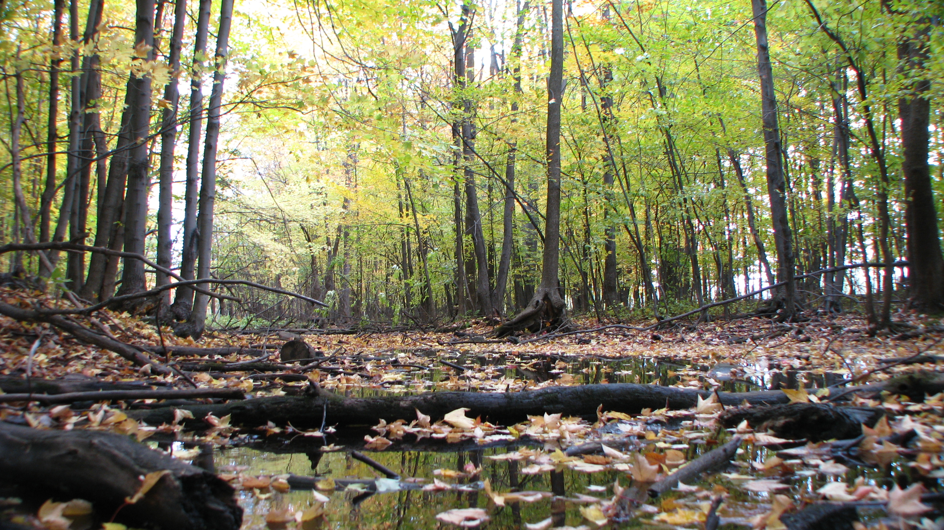 Parc Régional de Longueuil - la fin de l'été!